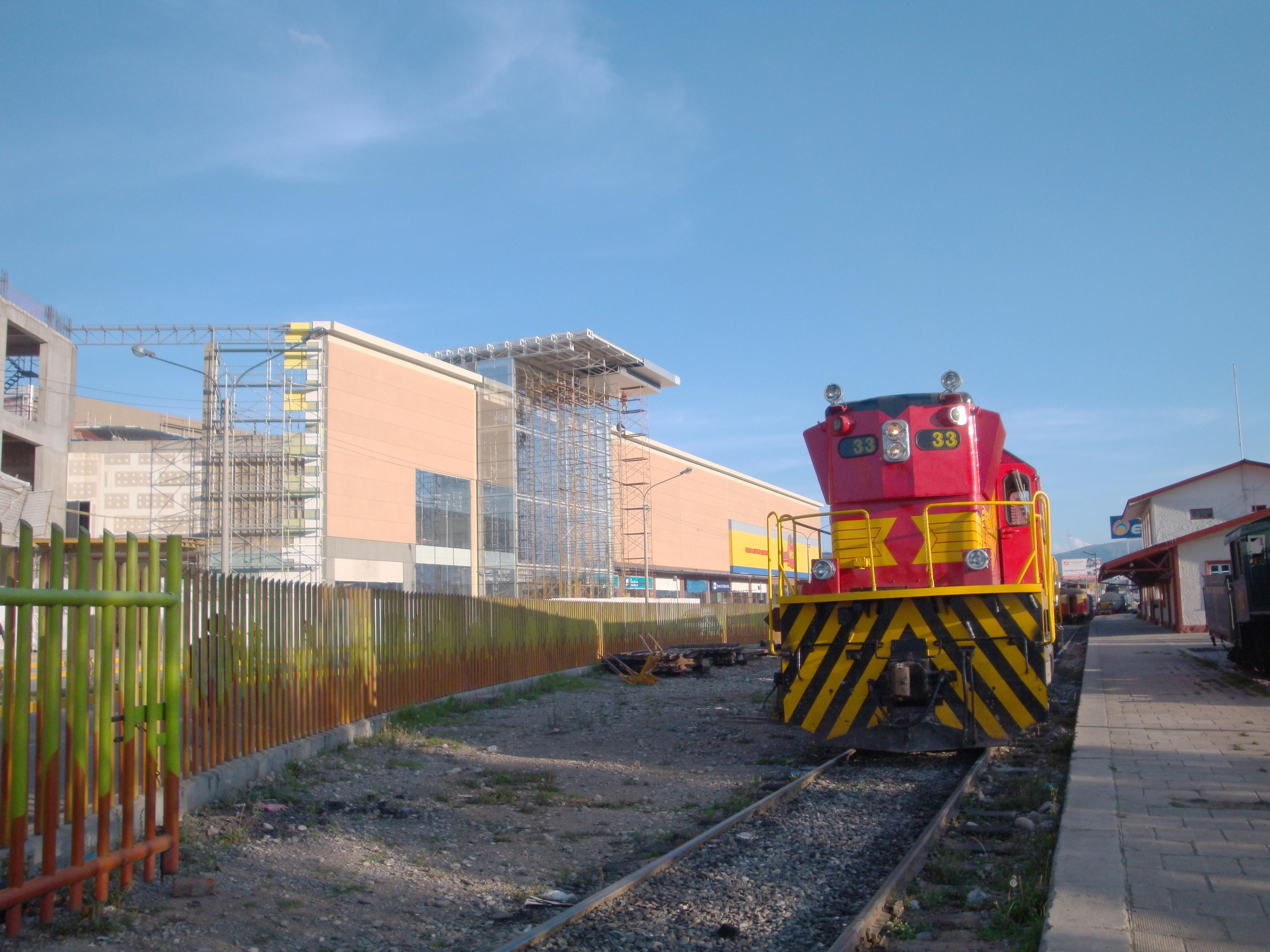 Real Plaza Huancayo durante su construcción frente al Ferrocarril